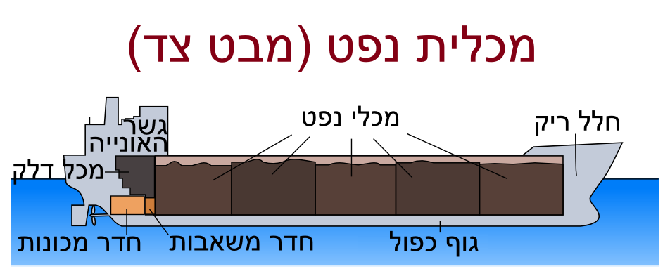 מכלית נפט (מבט צד)